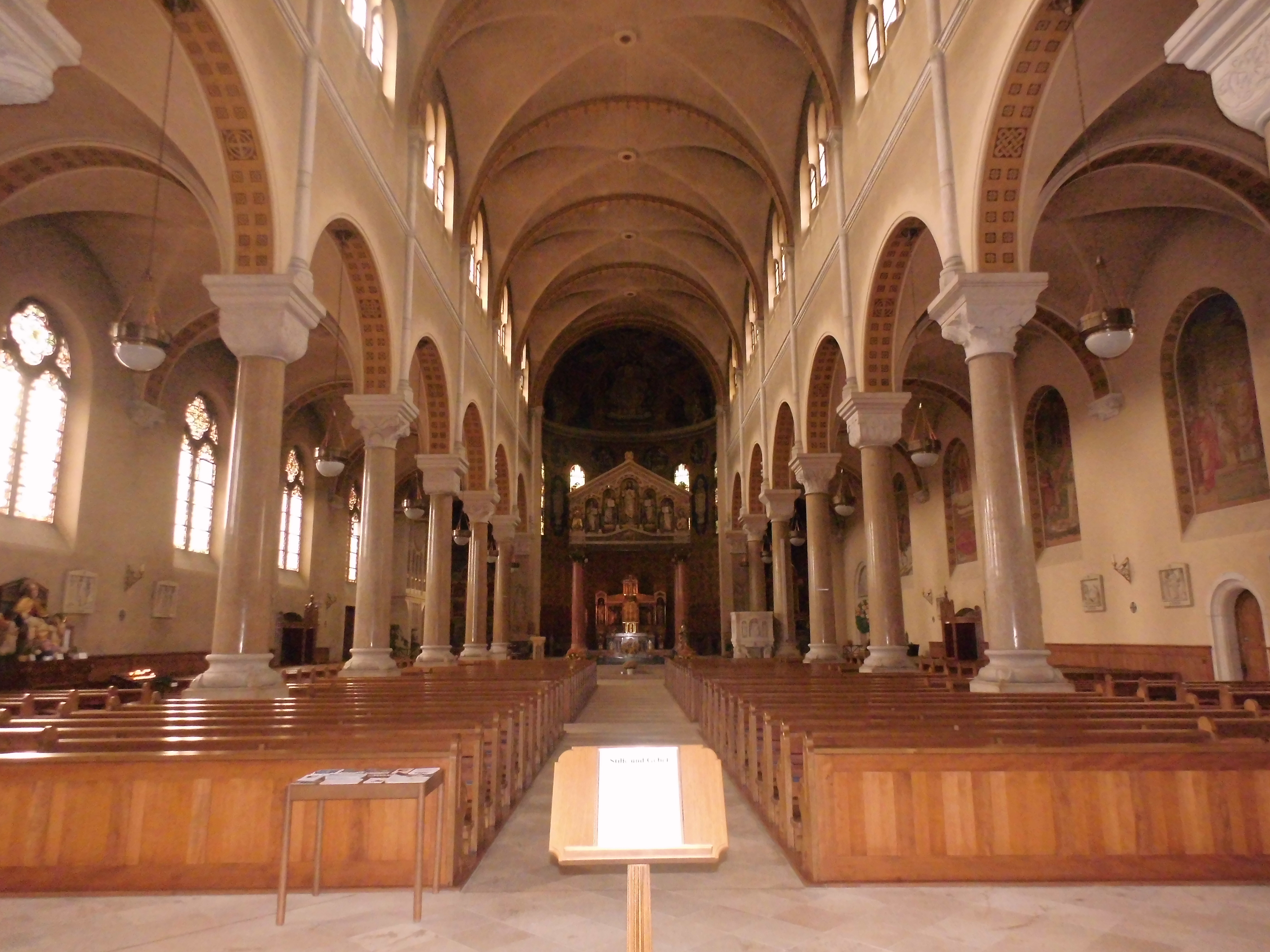 St. Martin in Olten (Innenansicht)